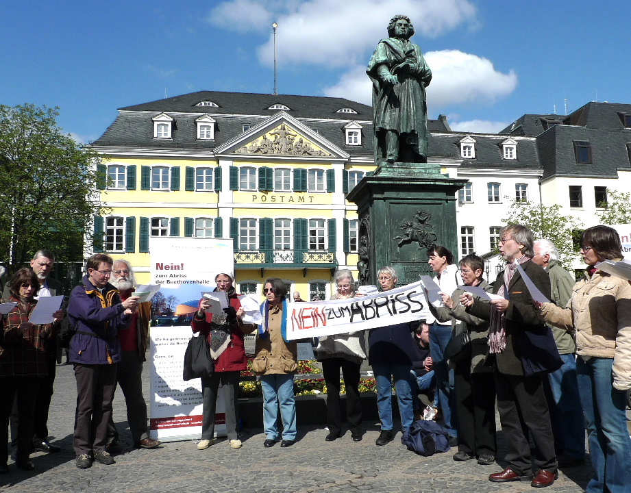 Ständchen zum Erhalt der Beethovenhalle vor dem Beethovendenkmal auf dem Münsterplatz in Bonn